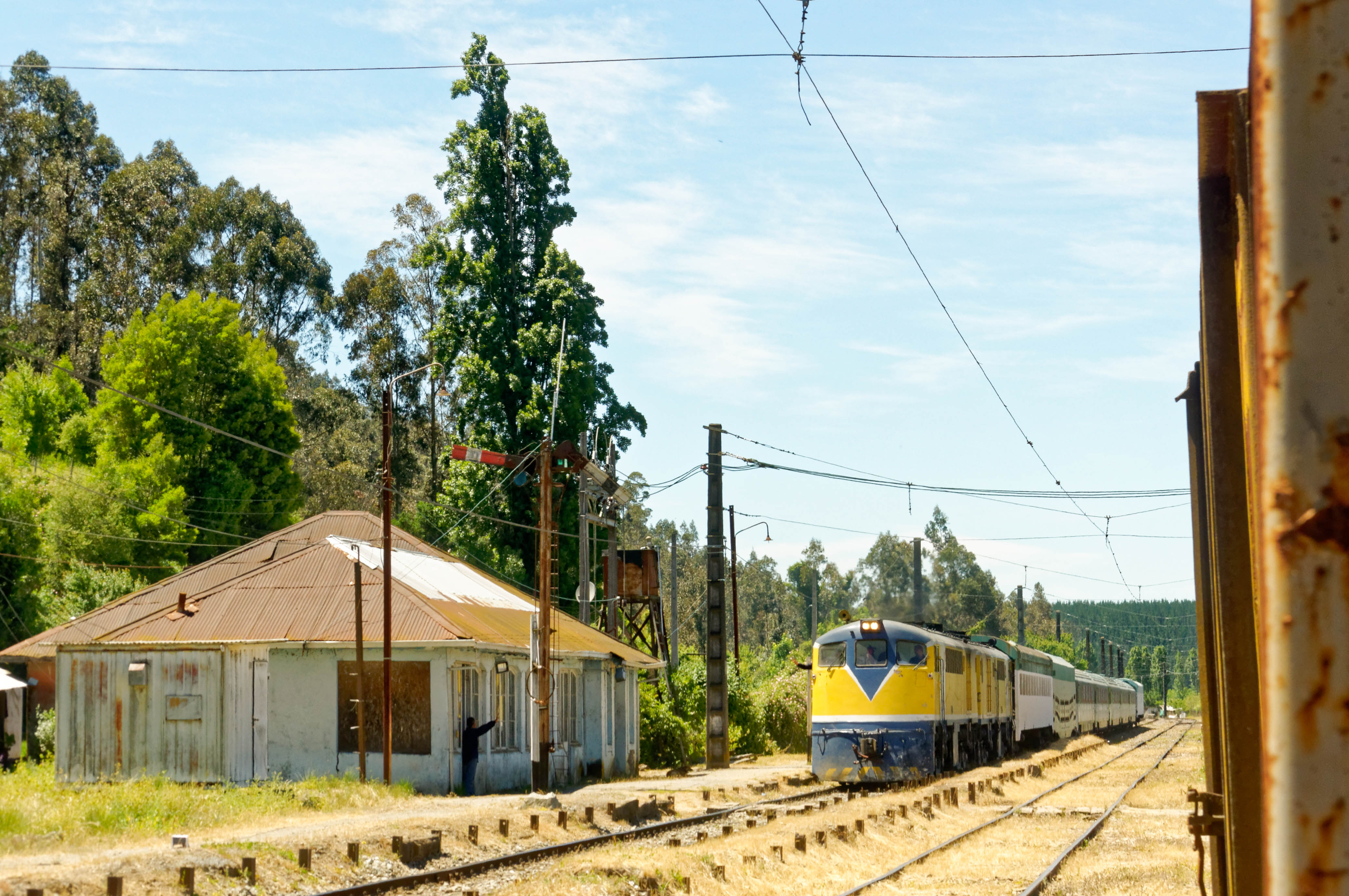 Aqui parece haberse detenido el tiempo…Tren procedente de Temuco destino Alameda. 26 de Noviembre 2017